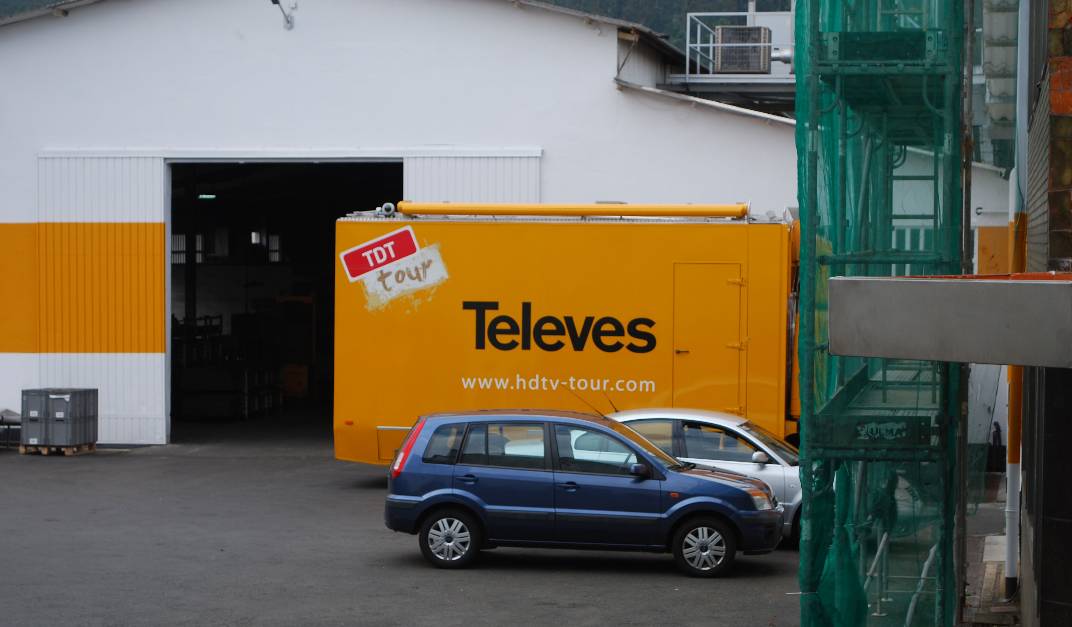 TDT Tour, Televés en Compostela A Coruña